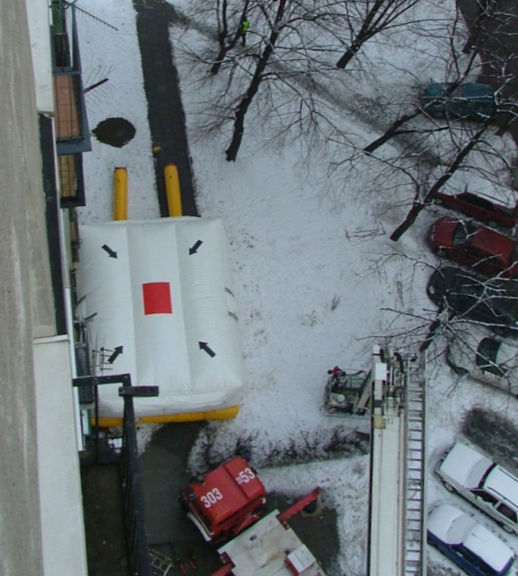 Straż pożarna, Warszawa, Al. Jerozolimskie 159